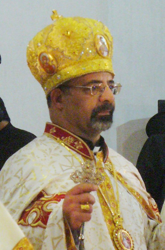 Der neue koptisch- katholische Patriarch Ibrahim Isaac Sidrak bei seiner Inthronisation am 12. März 2013 in der Kathedrale von Kairo